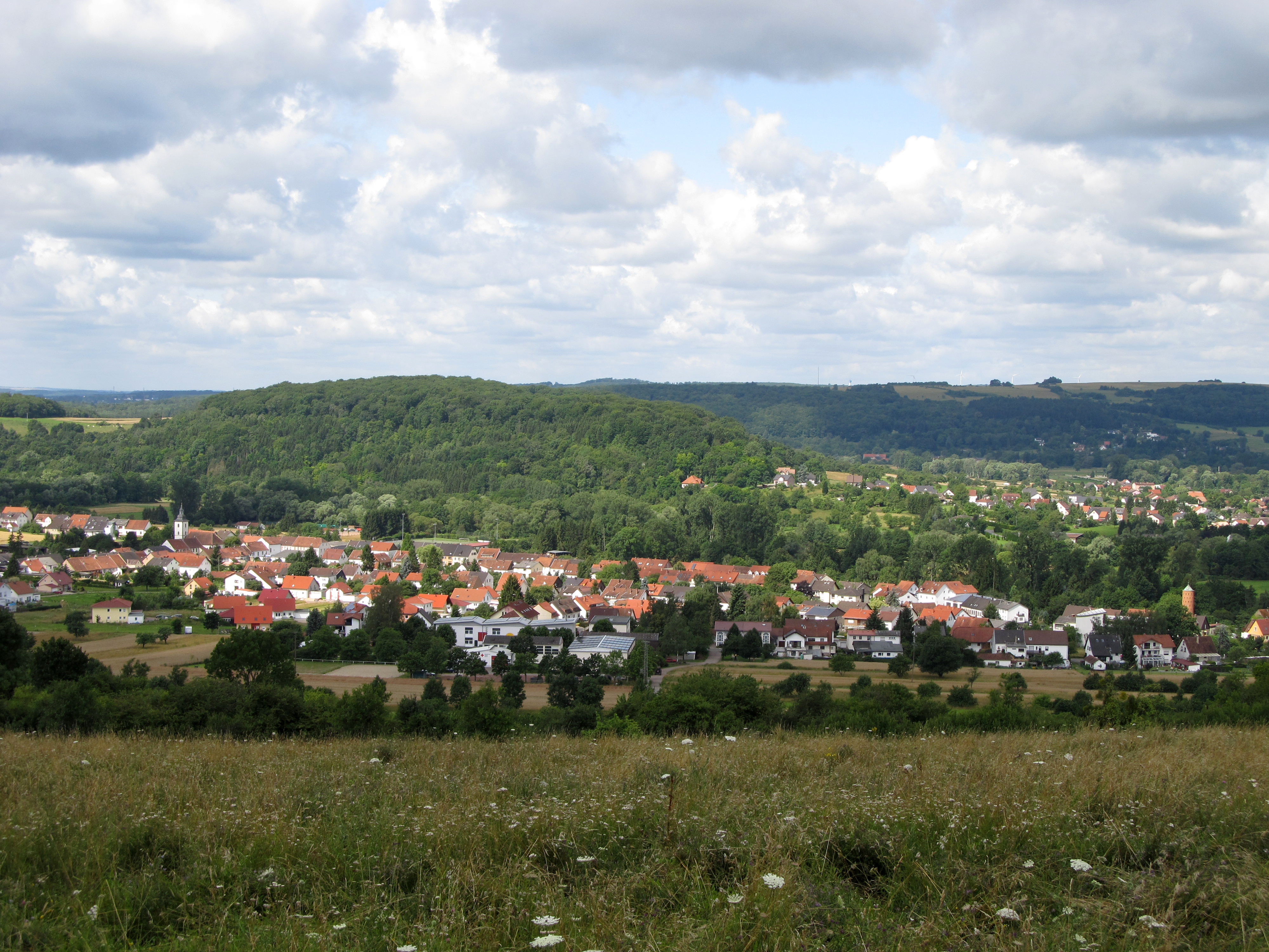 Blick auf Bliesmengen-Bolchen, Gemeinde Mandelbachtal, Saarland